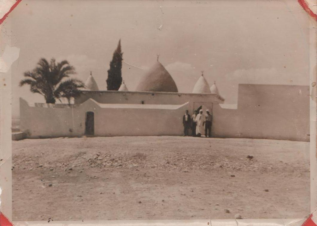 Mausolée du soufi, exégète, théologien et ascète Sidi Harrat Benaïssa El Idrissi.